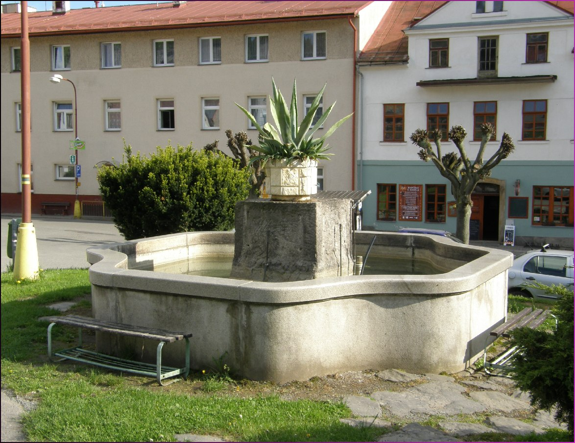 Kašna